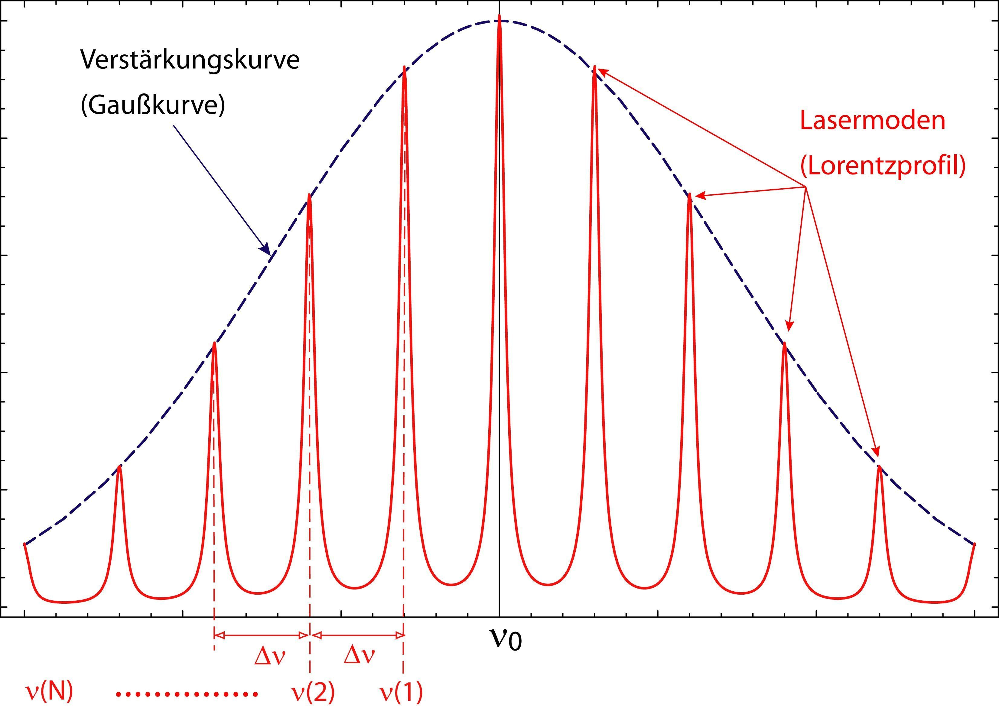 Schematische Darstellung von longitudinalen Lasermoden